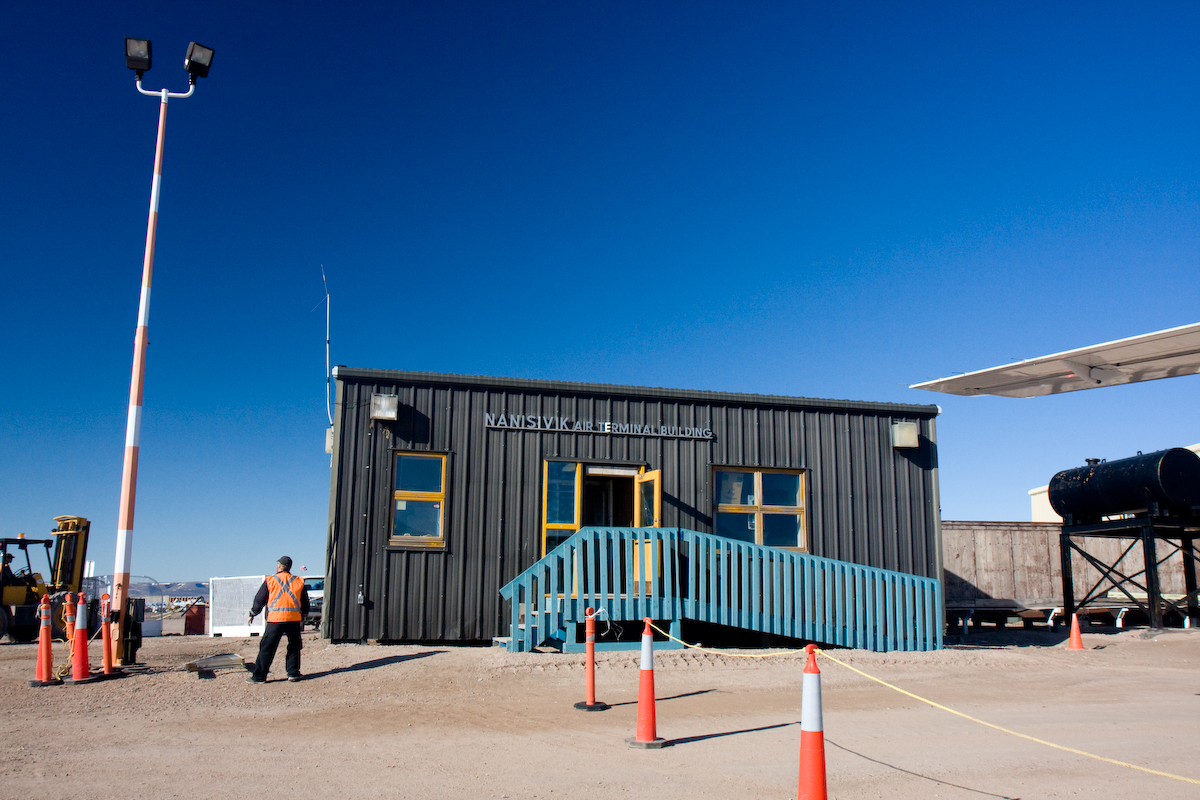 Nanisivik Airport